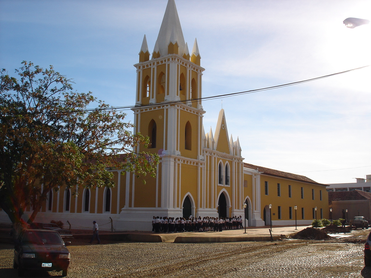 Iglesia de San Francisco, Coro (Estado Falcón, Venezuela)